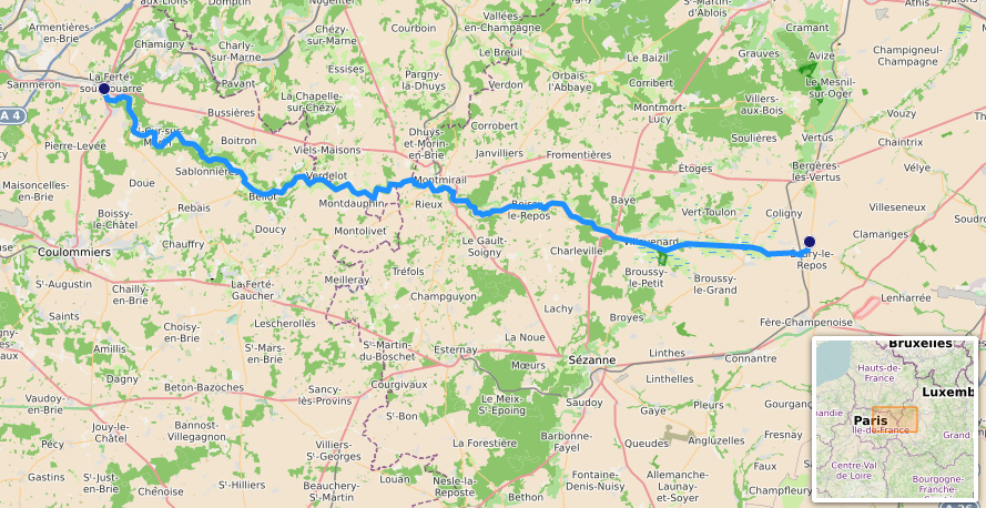 carte réalisée sur umap.openstreetmap, This map may be incomplete, and may contain errors. Don't rely solely on it for navigation.